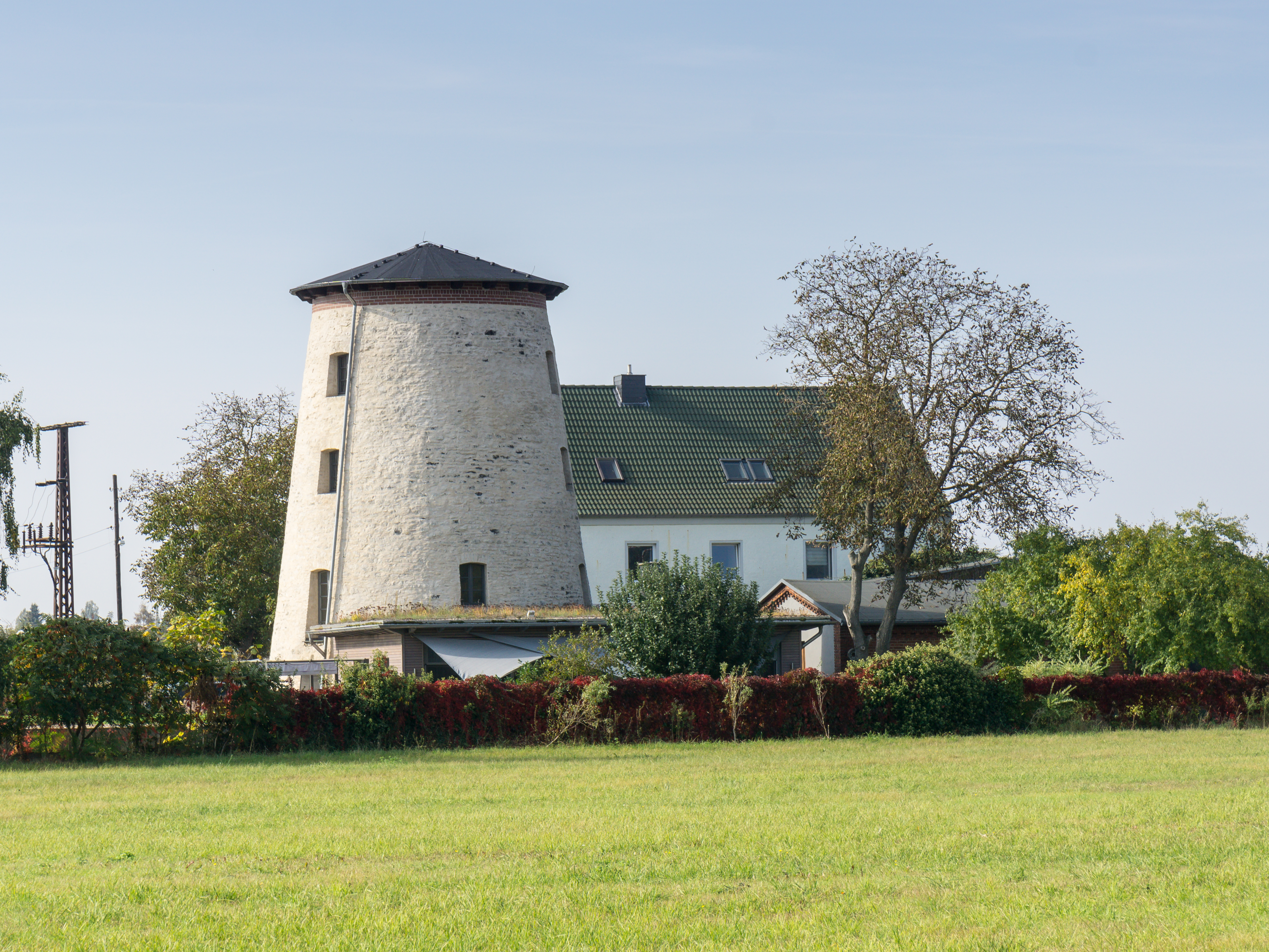 Turmholländermühle, Am Holländer 3 in Schönebeck (Elbe) OT Felgeleben